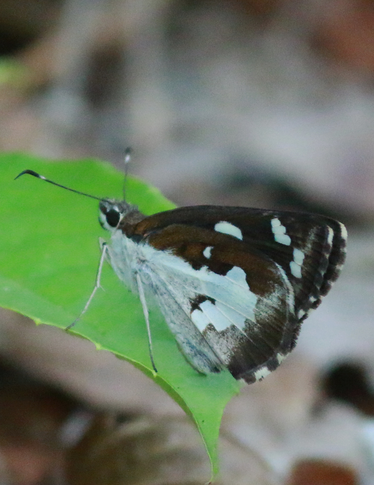 വെള്ളച്ചാത്തൻ ചിത്രശലഭം